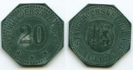 photographies d'une pièce de 20 pfennigs de substitution émise par la ville de Bouxwiller (Basse-Alsace) en 1917